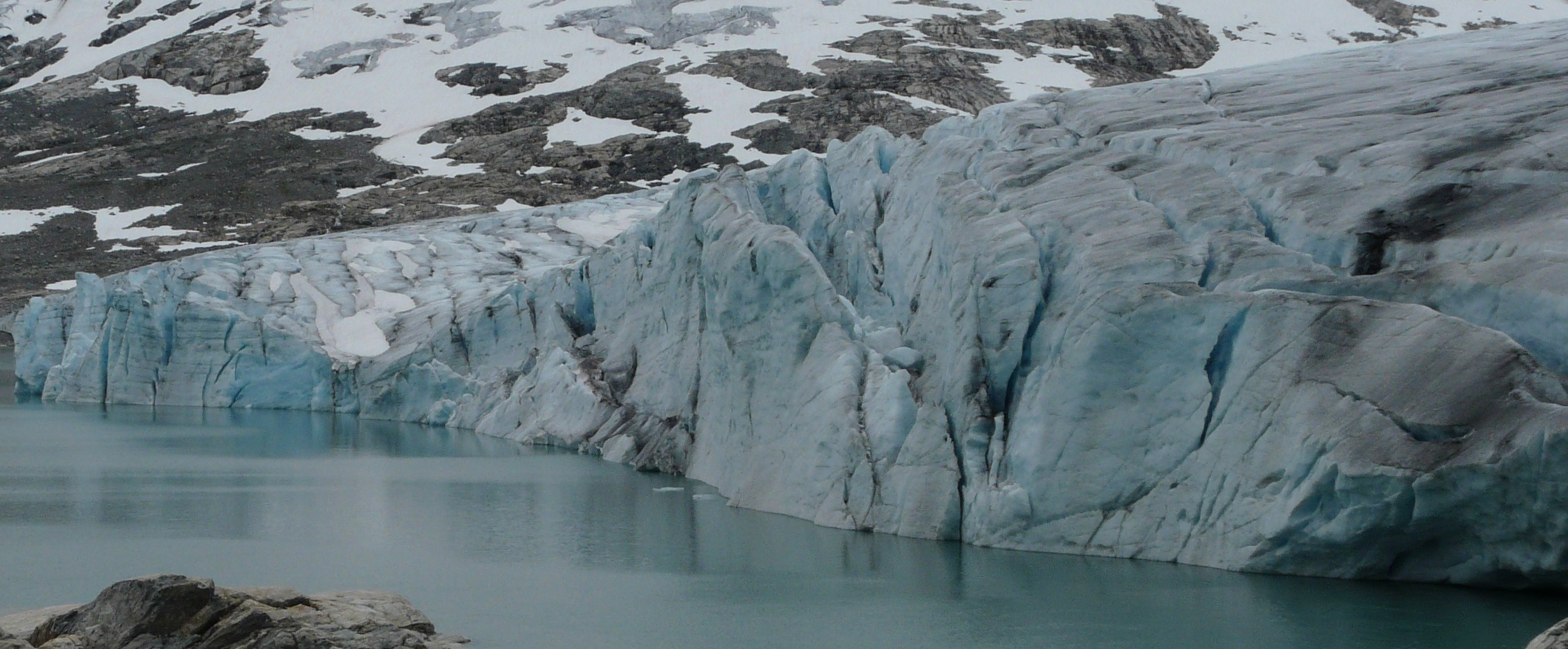 View of Glacier and Styggevatnet